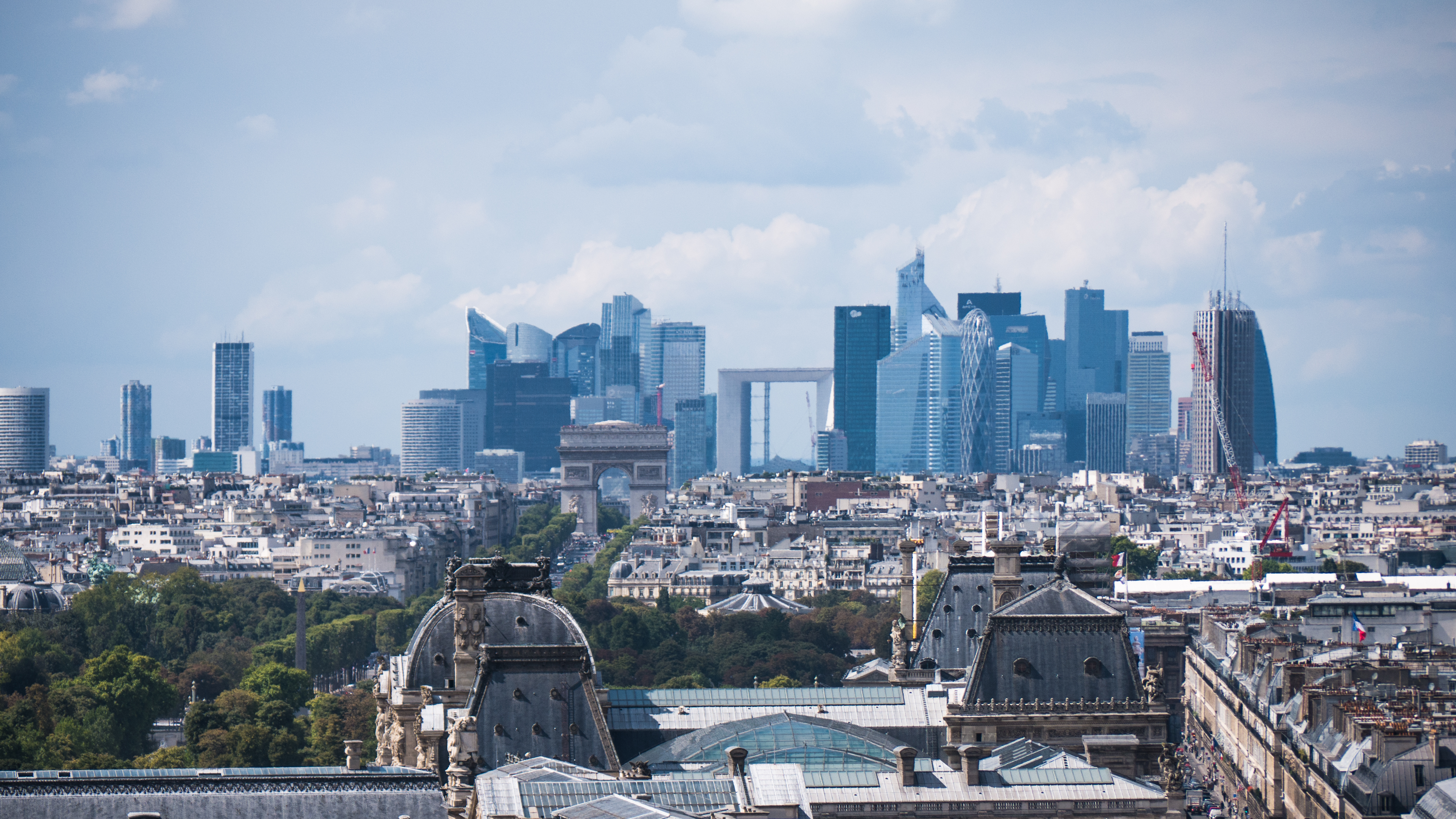 Le quartier de la Défense vu de la Tour Saint-Jacques, Paris.